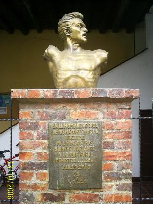 Busto de Jose Antonio Galán en Guaduas